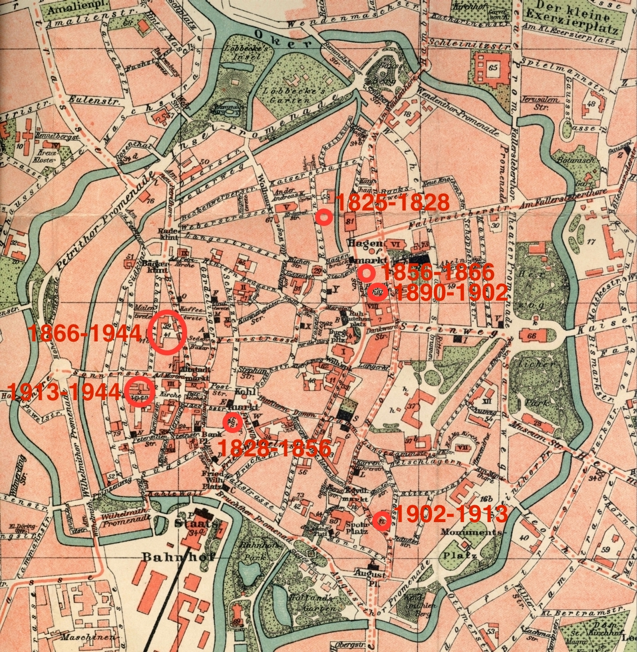 Standorte des Realgymnasiums Braunschweig bis 1944